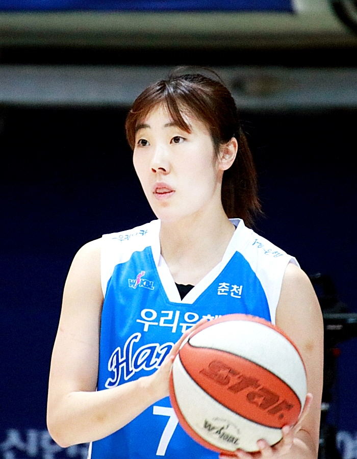 160101 여자농구 신한은행 vs 우리은행 직찍 2